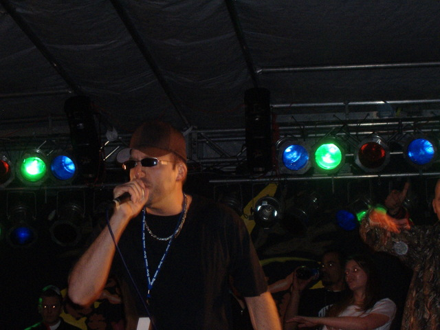 Frauenarzt; Konzertfoto